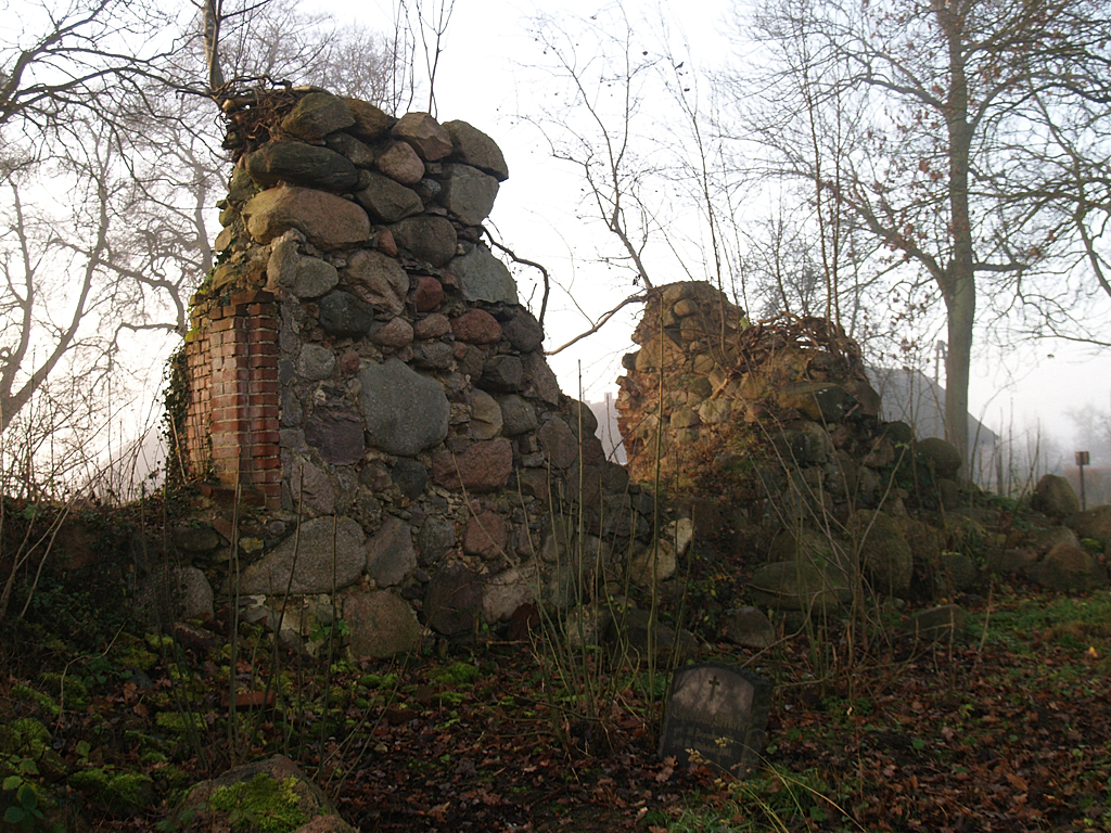 Rzęskowo - ruina kościoła, XV